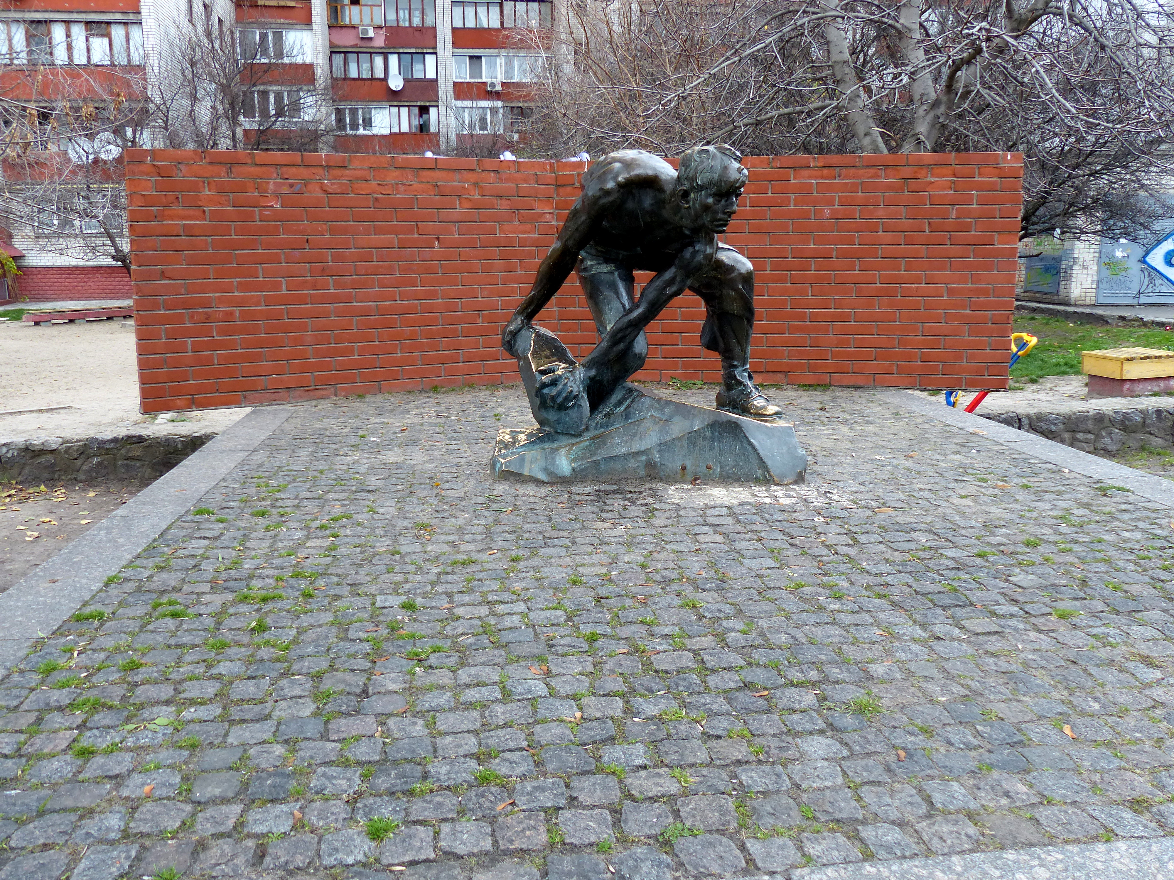 Пам'ятник «Булижник — зброя пролетаріату» (копія), Київ, Червона Пресня пл.